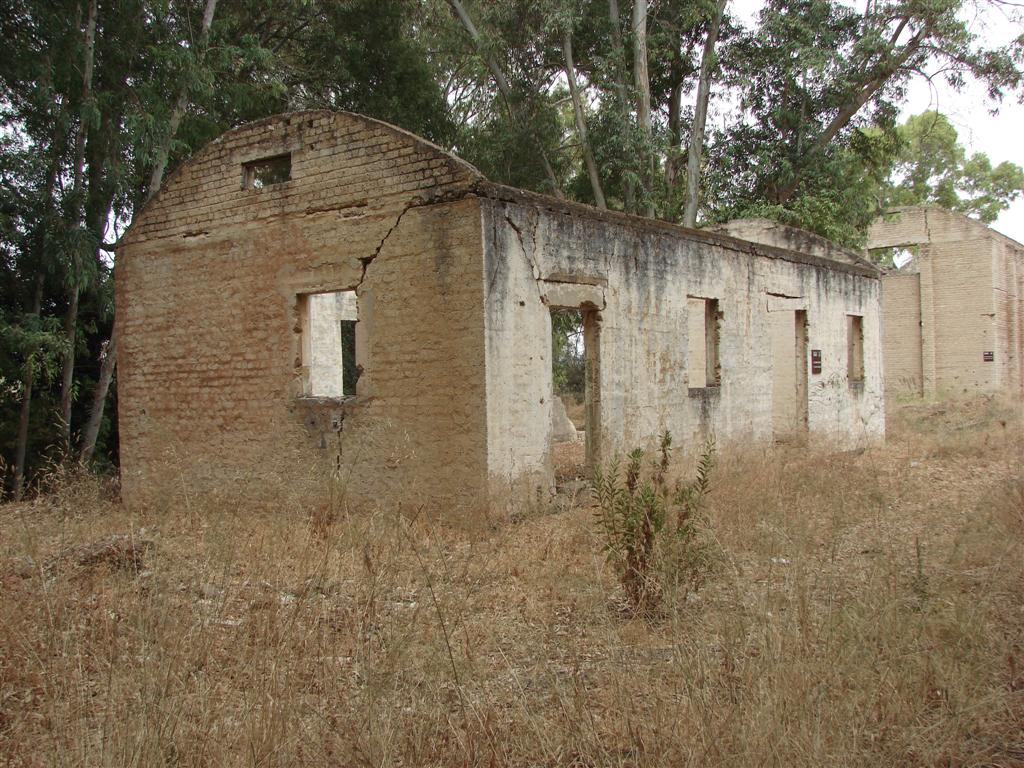 תחנת הרכבת בית נבאללה - הבניין המרכזי של קומה אחת